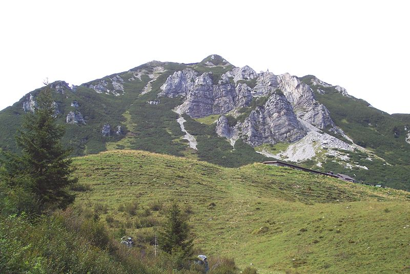 Foto tratta dalla wikipedia in lingua friulana :fur:image:Mont Narvenis.jpg